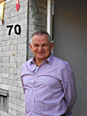 Leo Hendrickx is een voormalig Belgisch voetbalspeler